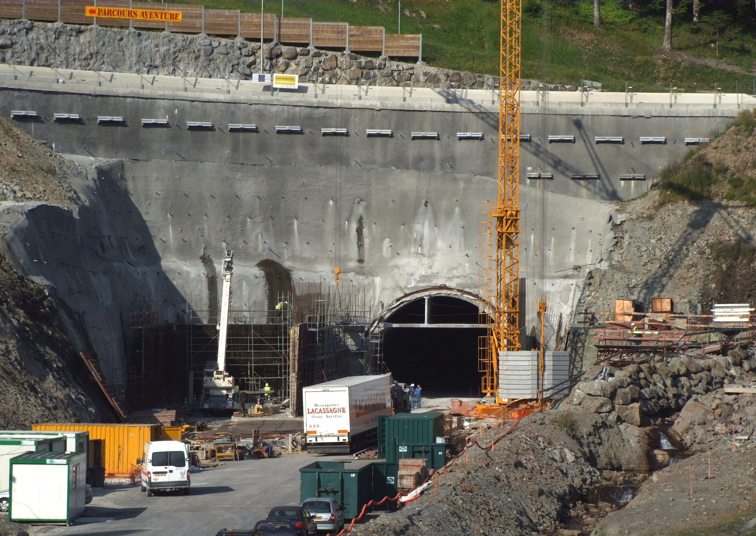 Second tunnel routier du Lioran en cours de construction